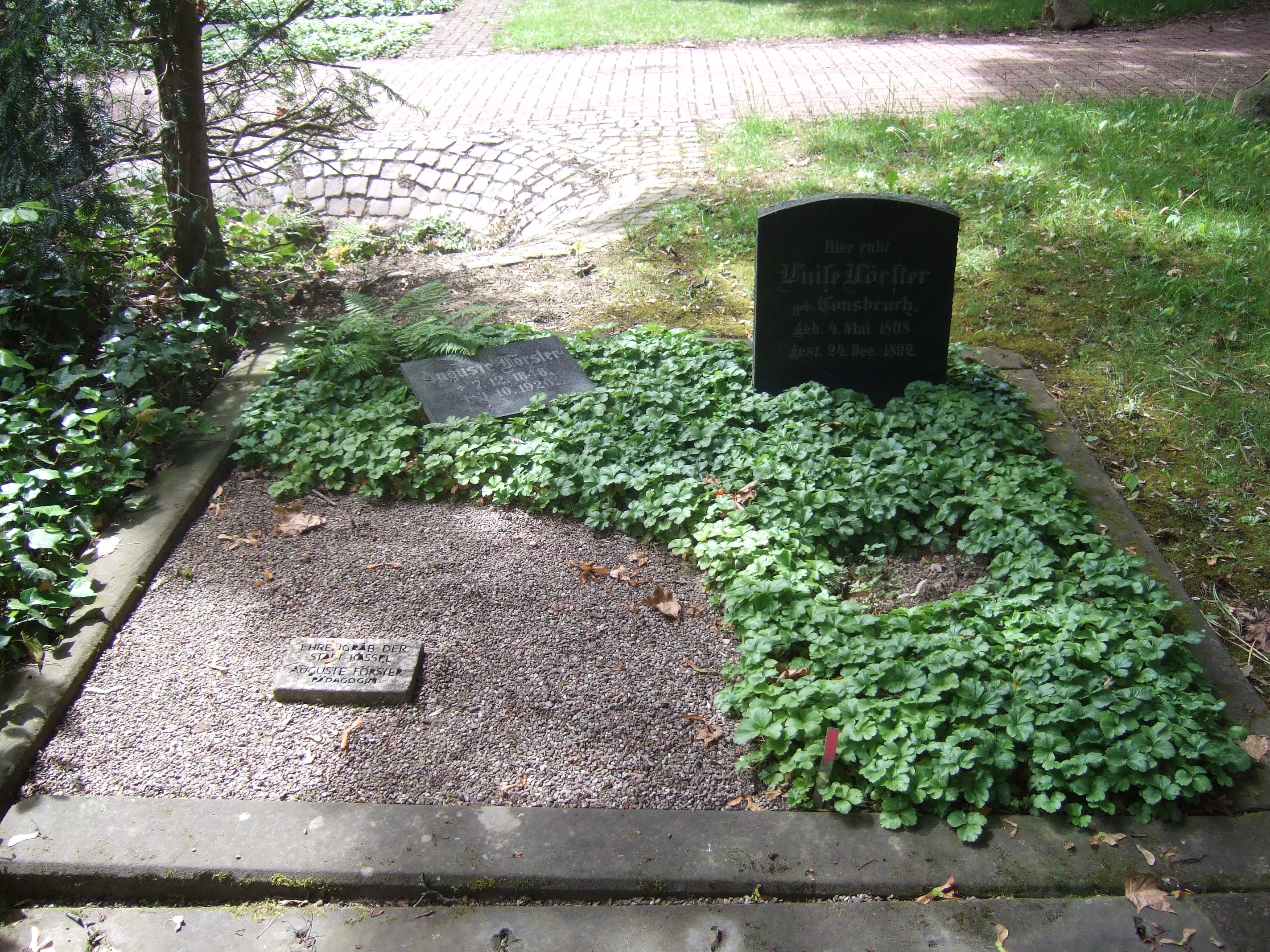 Grab von Auguste Förster auf dem Hauptfriedhof Kassel.